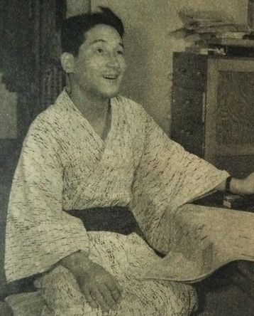 原田泰夫